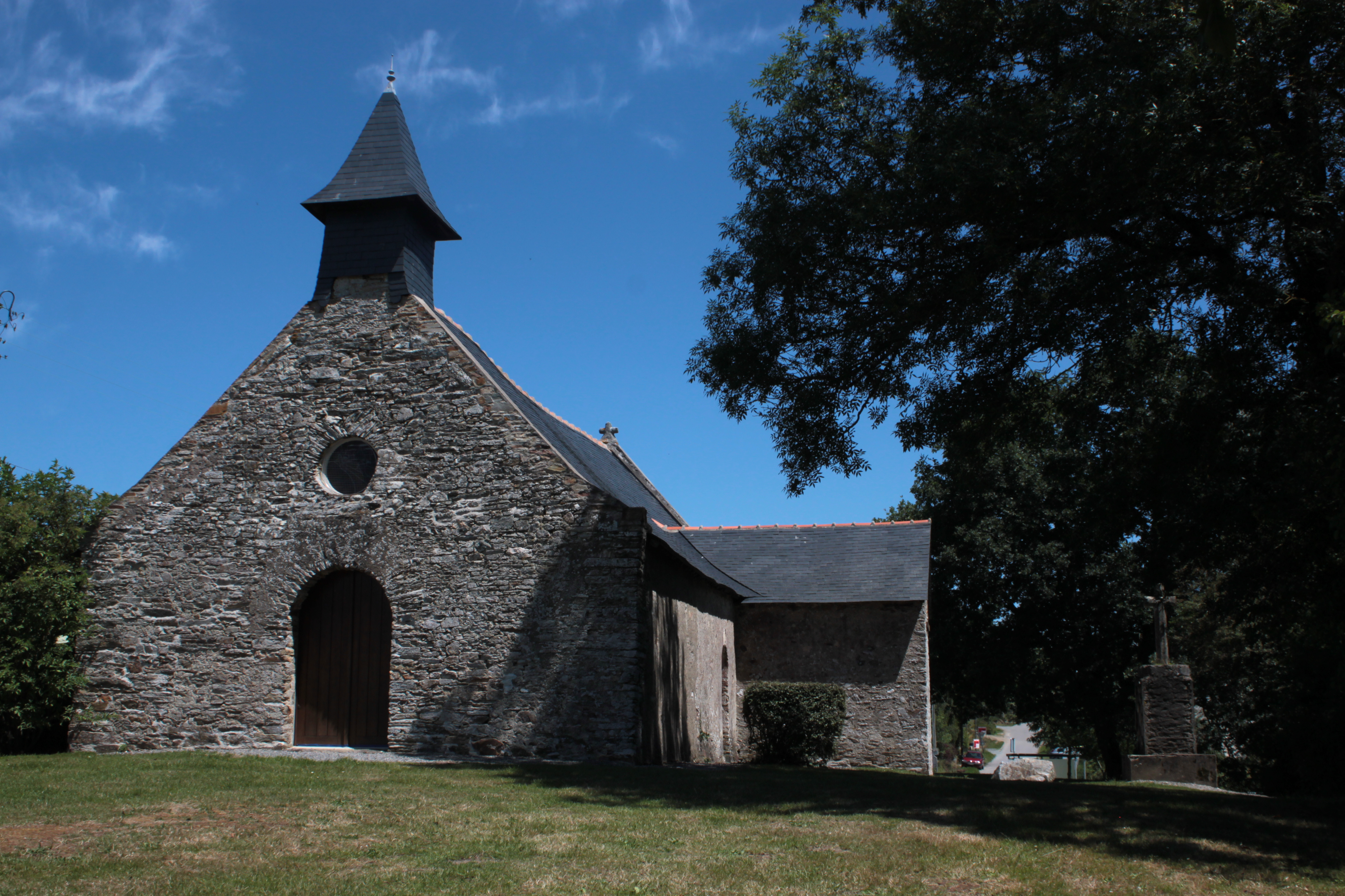 Chapelle Saint-Lomer, X°-XIII°, Sainte-Anne-sur-Brivet.